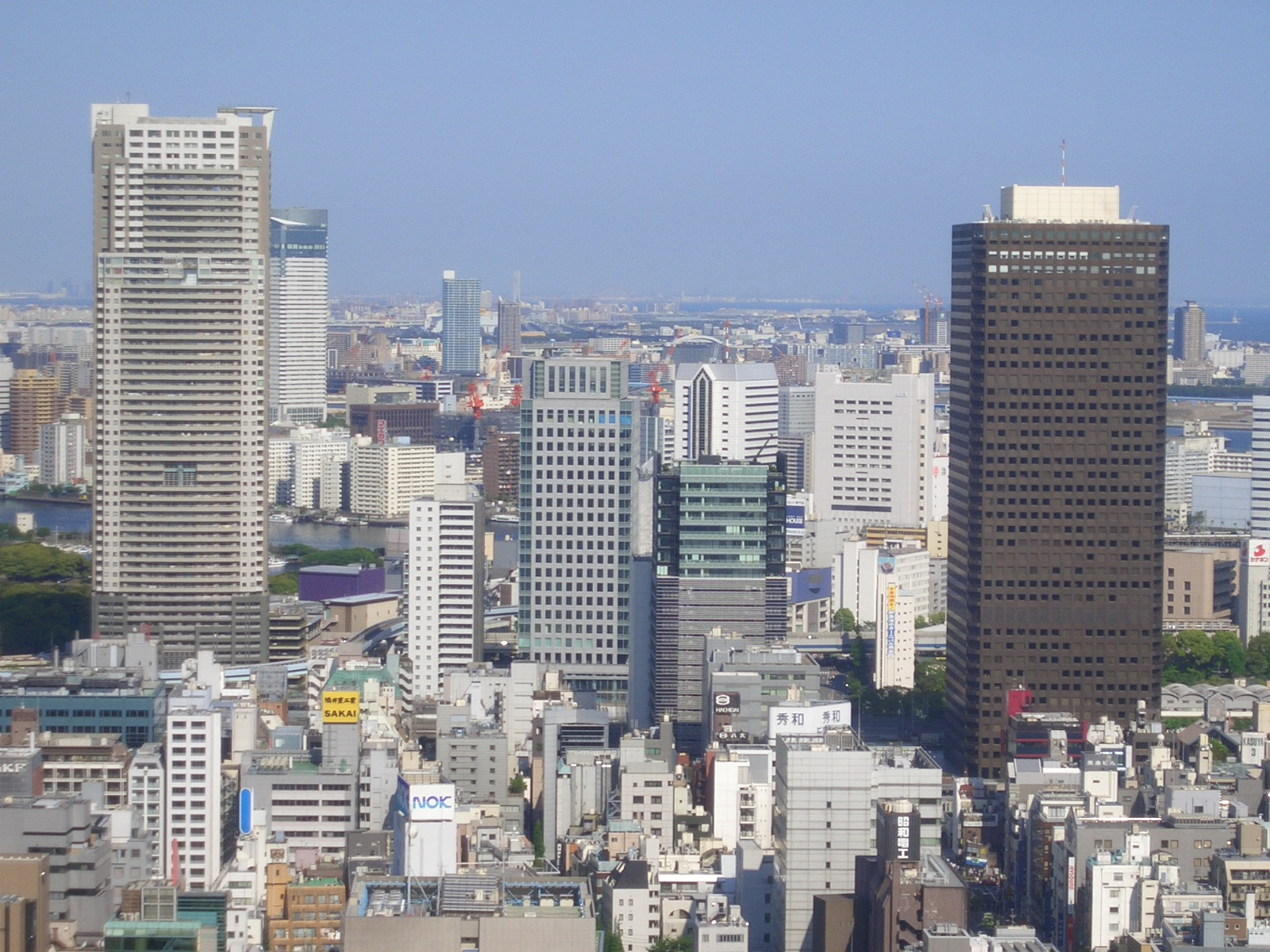 浜松町付近ビル(東京タワー展望台から撮影)